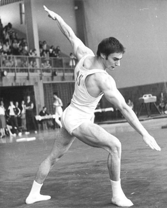 Roland Brückner ADN-ZB Liebers-24-5-81 Italien-Rom: Bei den Turn-Europameisterschaften der Männer in Rom wurde Roland Brückner (DDR) Vierter im Mehrkampf und Europameister gemeinsam mit Juri Koroljow (UdSSR) am Boden (19,65). Das Foto ist eine frühere Aufnahme!)